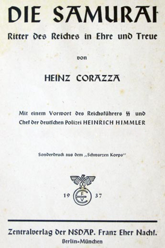 Himmler était tellement obnubilé par les samouraïs qu'il en vint à commander un livret sur leur histoire et leurs valeurs, ouvrage de propagande qui devait ensuite être distribué aux membres de la SS. Ce livret fut publié en 1937 par la maison d'édition du parti nazi (Zentralverlag der NSDAP, Franz Eher Nachf.; Auflage: Sonderdruck aus dem Schwarzen Korps) sous le titre "Die Samurai, Ritter des Reiches in Ehre und Treue", ou "Les samouraïs, chevaliers de l'empire dans l'honneur et la loyauté". L'auteur du livre, Heinz Corazza, y insistait sur l'importance supposée des samouraïs en tant que force ayant permis au Japon de devenir une puissance dirigeante mondiale. Himmler rédigeât une introduction dans laquelle il mit l'accent sur le rôle similaire que devait tenir la SS en Allemagne. Il y affirmait que les lecteurs en arriveraient à "considérer que ce sont principalement les minorités incarnant la valeur la plus haute qui donnent au peuple une vie qui, en termes terrestres, est éternelle".